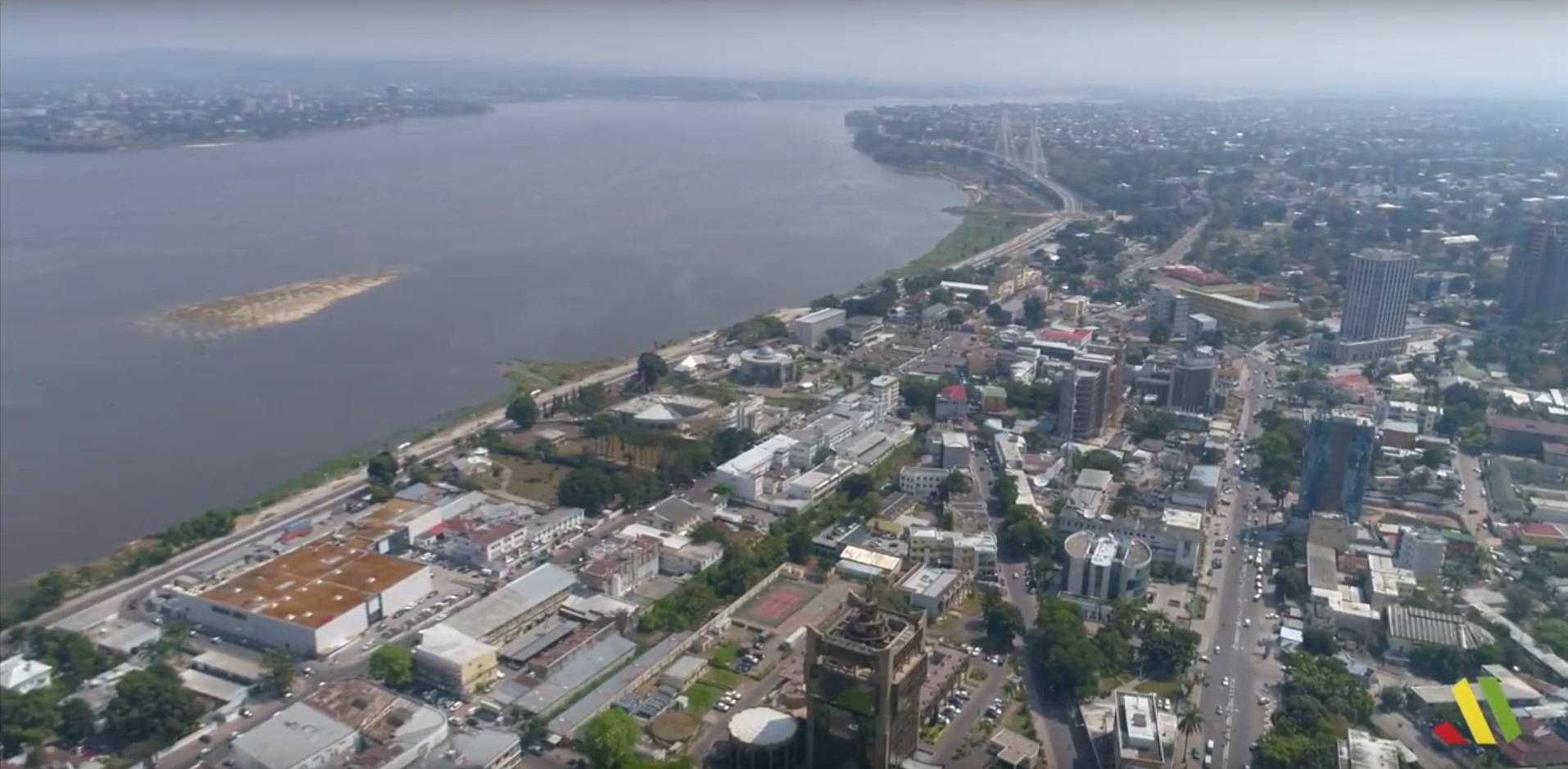 Brazzaville bird eye view